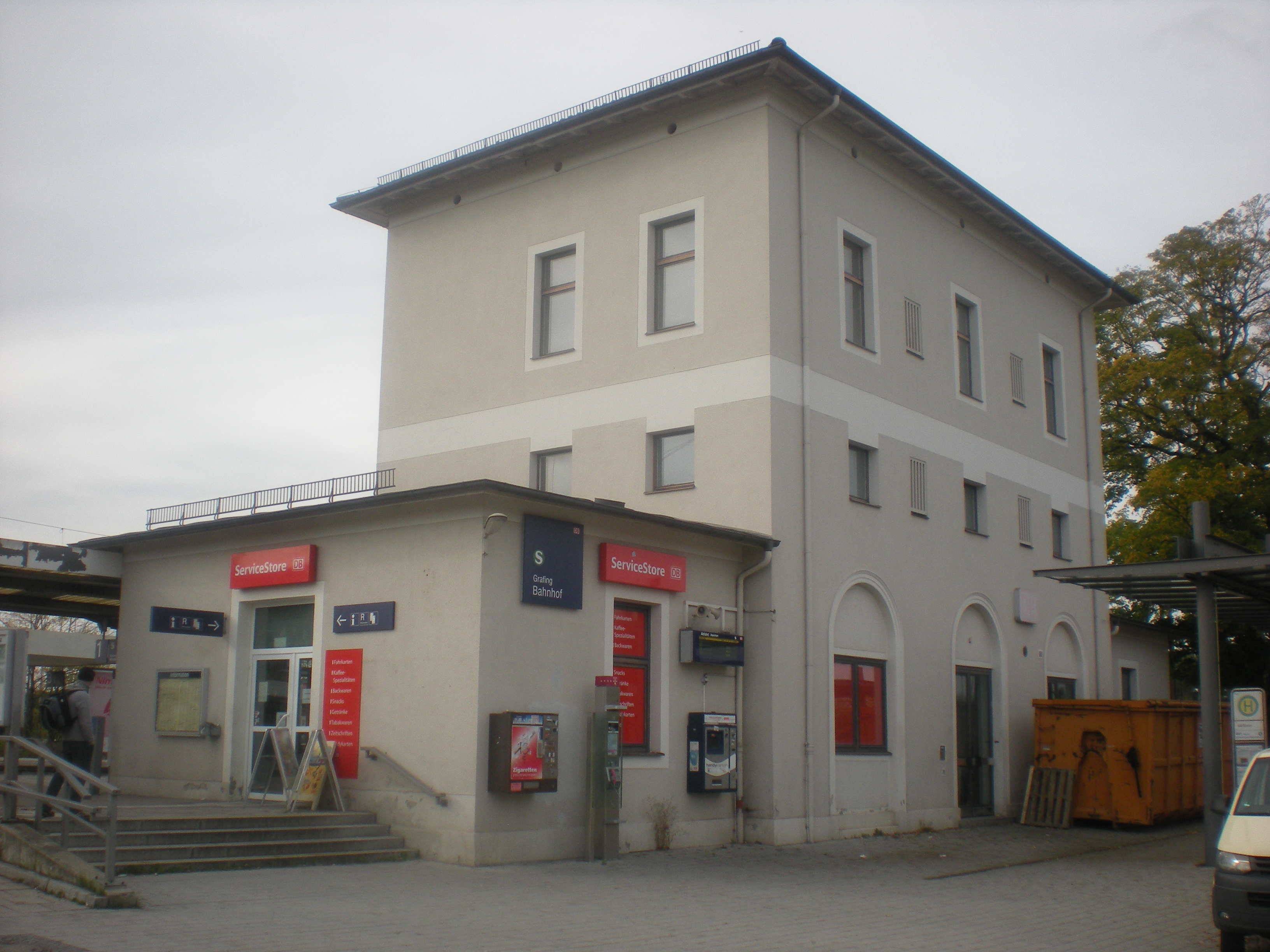 Empfangsgebäude des Grafinger Bahnhofs von der Straßenseite